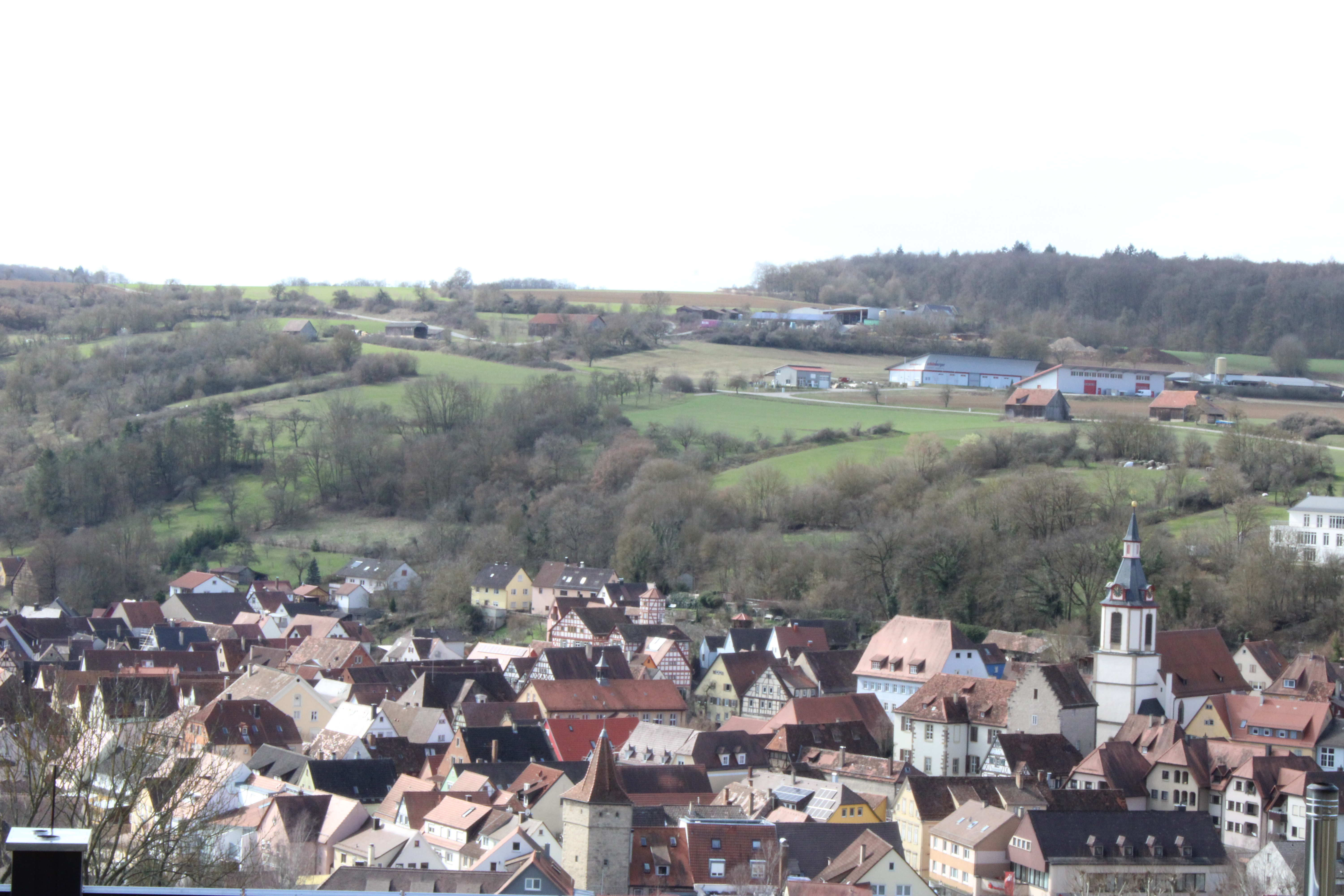 Creglingen von Nordosten gesehen